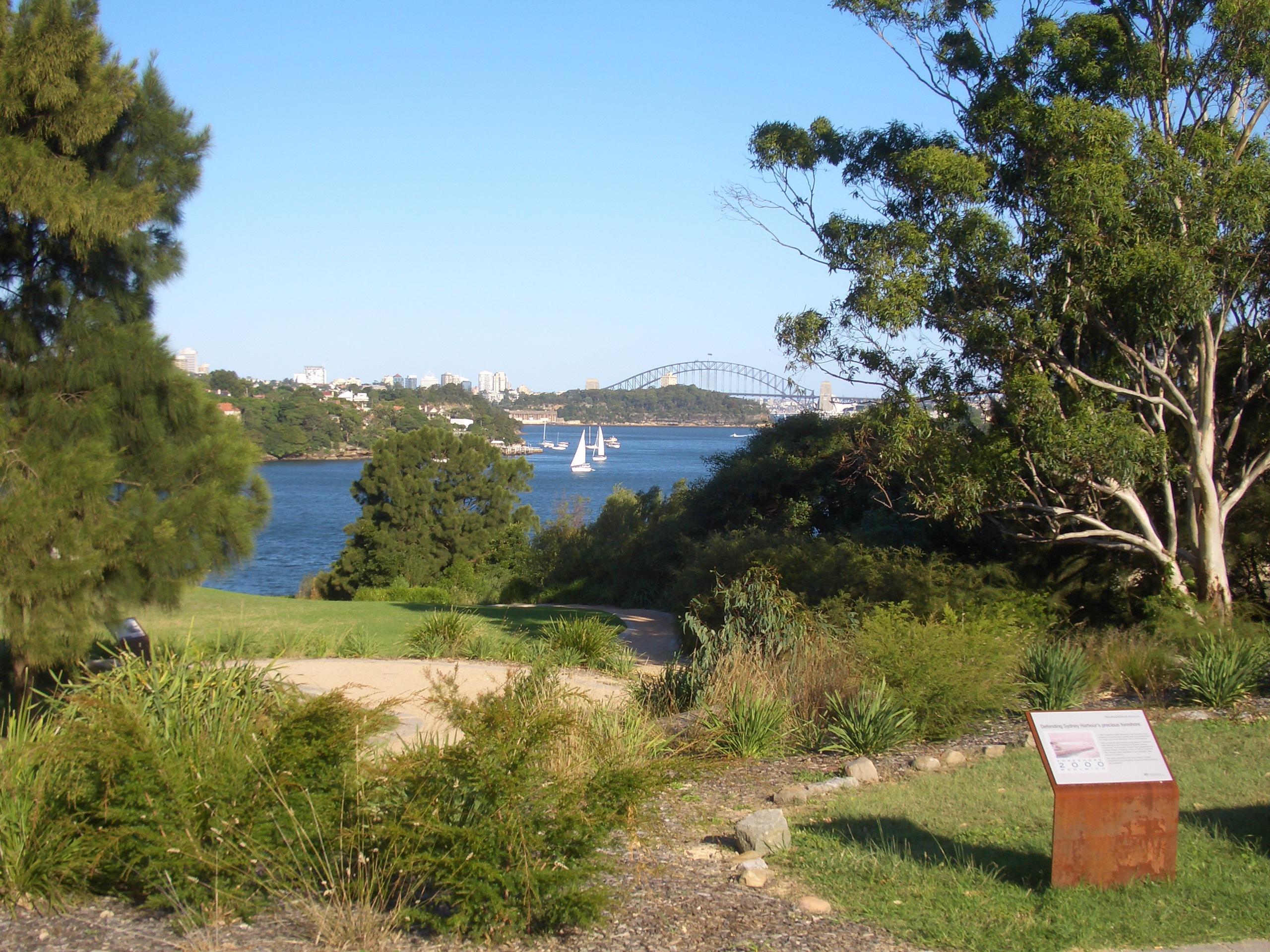 Woolwich Lookout, Sydney